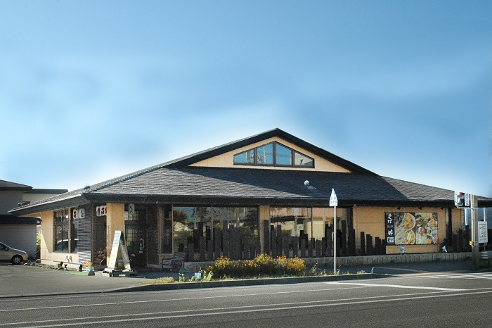 一休そば総本店画像